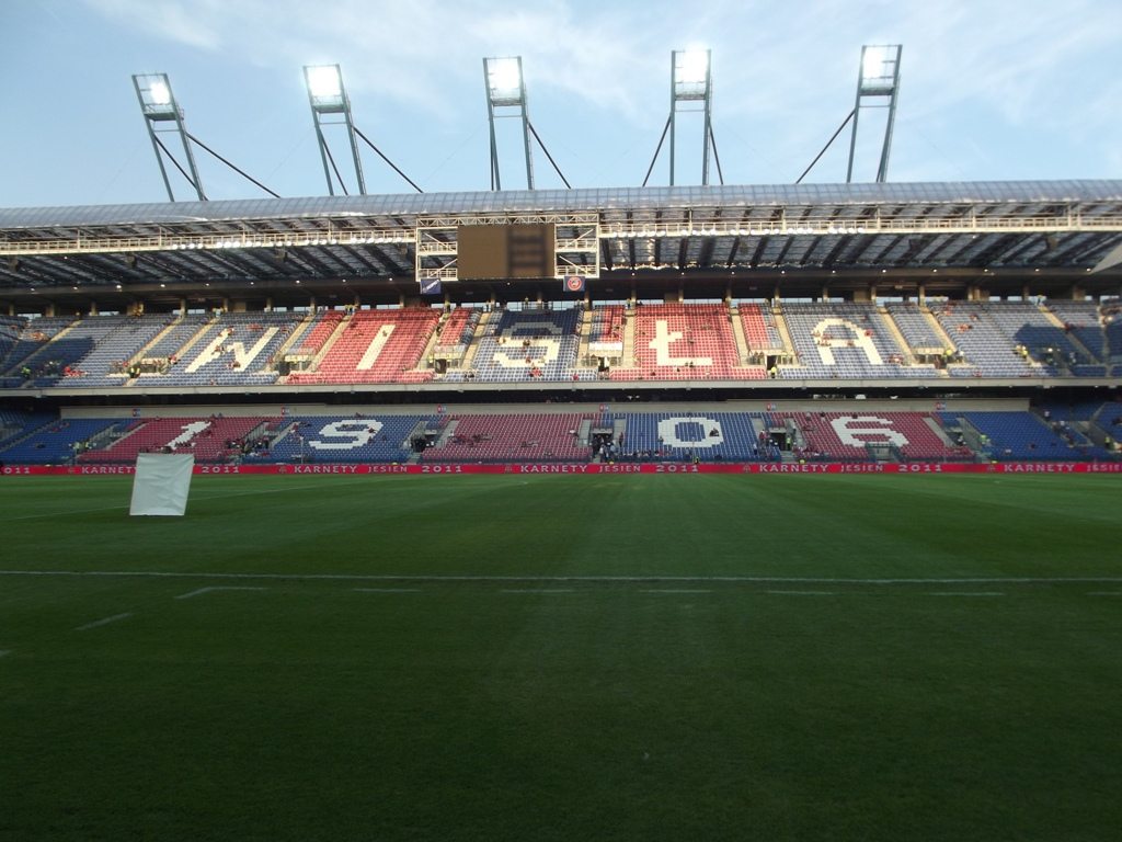 Zdjęcie zrobione podczas meczu eliminacji do Ligi Mistrzów UEFA pomiędzy Wisłą Kraków a Litexem Łowecz.